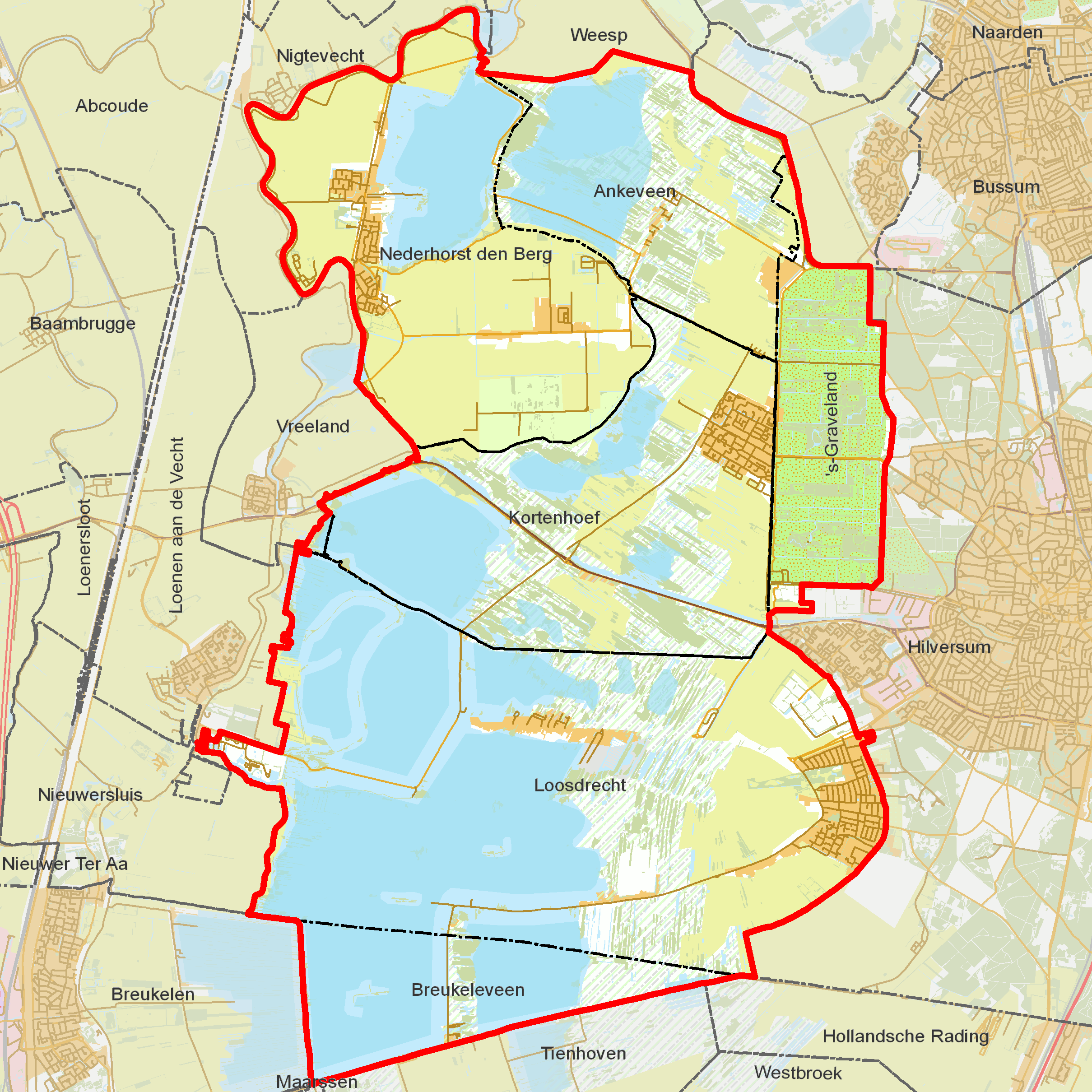 BAG woonplaatsen - Gemeente Wijdemeren.png